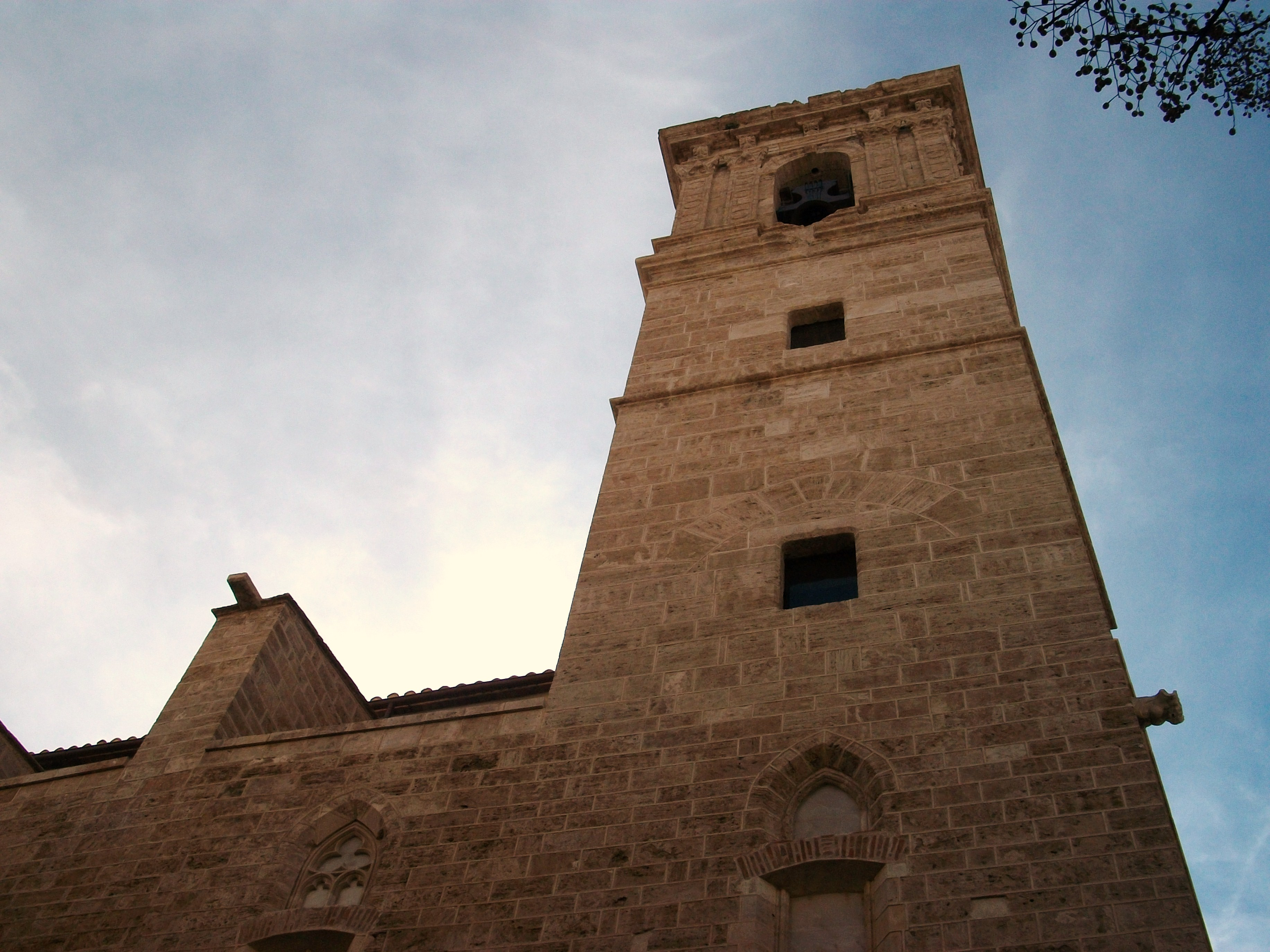 Campanar de l'església de Sant Martí de València